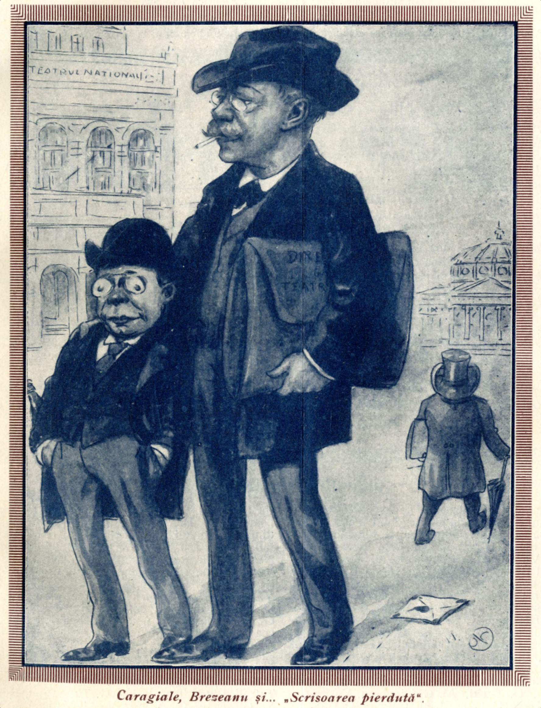 Caragiale, Brezeanu și o scrisoare pierdută - caricatură de Nicolae Petrescu-Găină